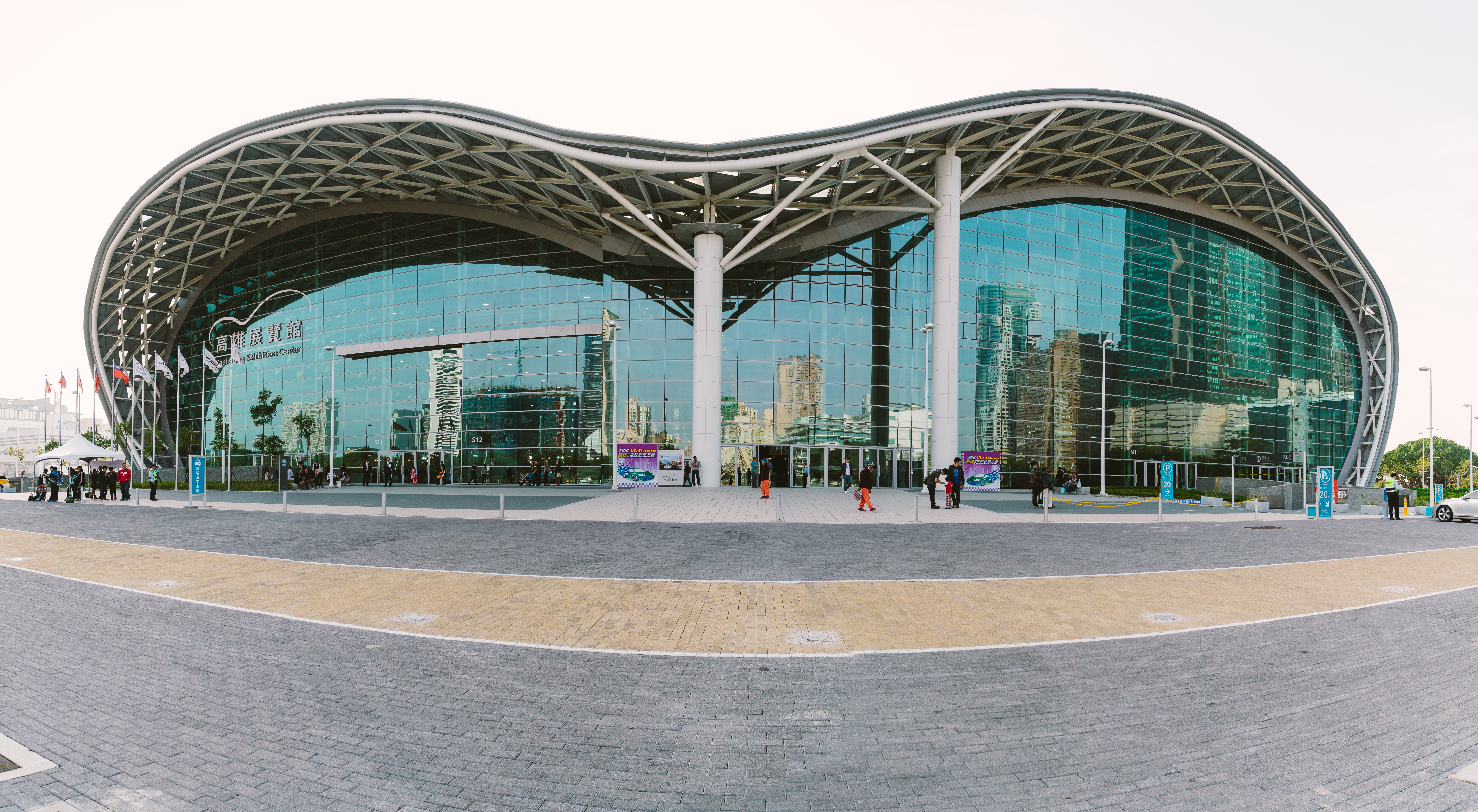 高雄展覽館正面全景攝影。